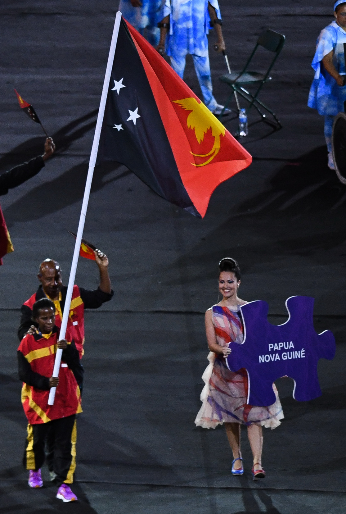 Rio de Janeiro - Cerimônia de abertura dos Jogos Paralmpicos Rio 2016 no Estdio do Maracanã (Tomaz Silva/Agência Brasil)